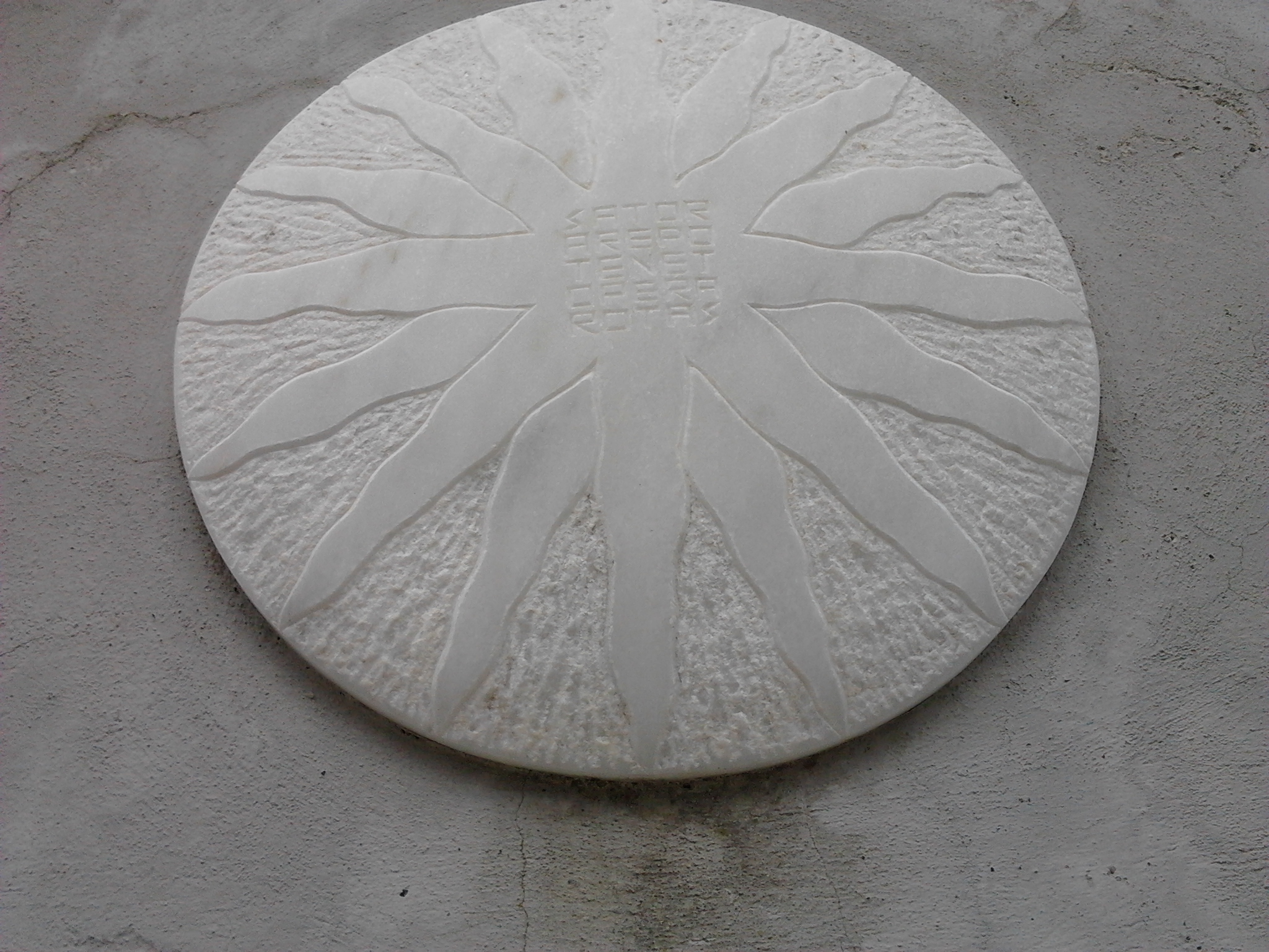 Quadrato del Sator presente sulla fontana della piazza principale del Borgo di Pulica